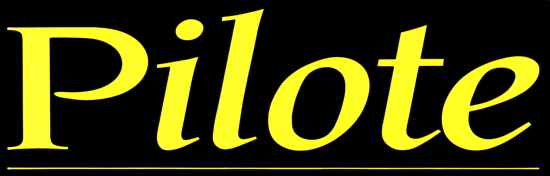 Logotype de Pilote, de la couverture du #29, nouvelle série (1988).